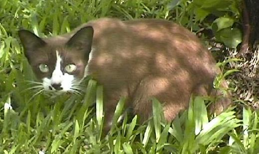 חתול מפוחד. זכויות היוצרים שייכות לי